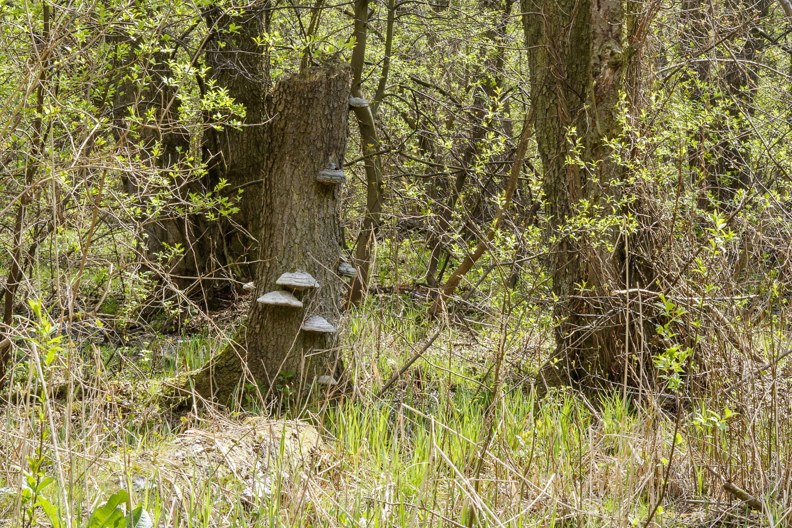 Złom, Zakole Wawerskie w Warszawie, las olchowy, złom.